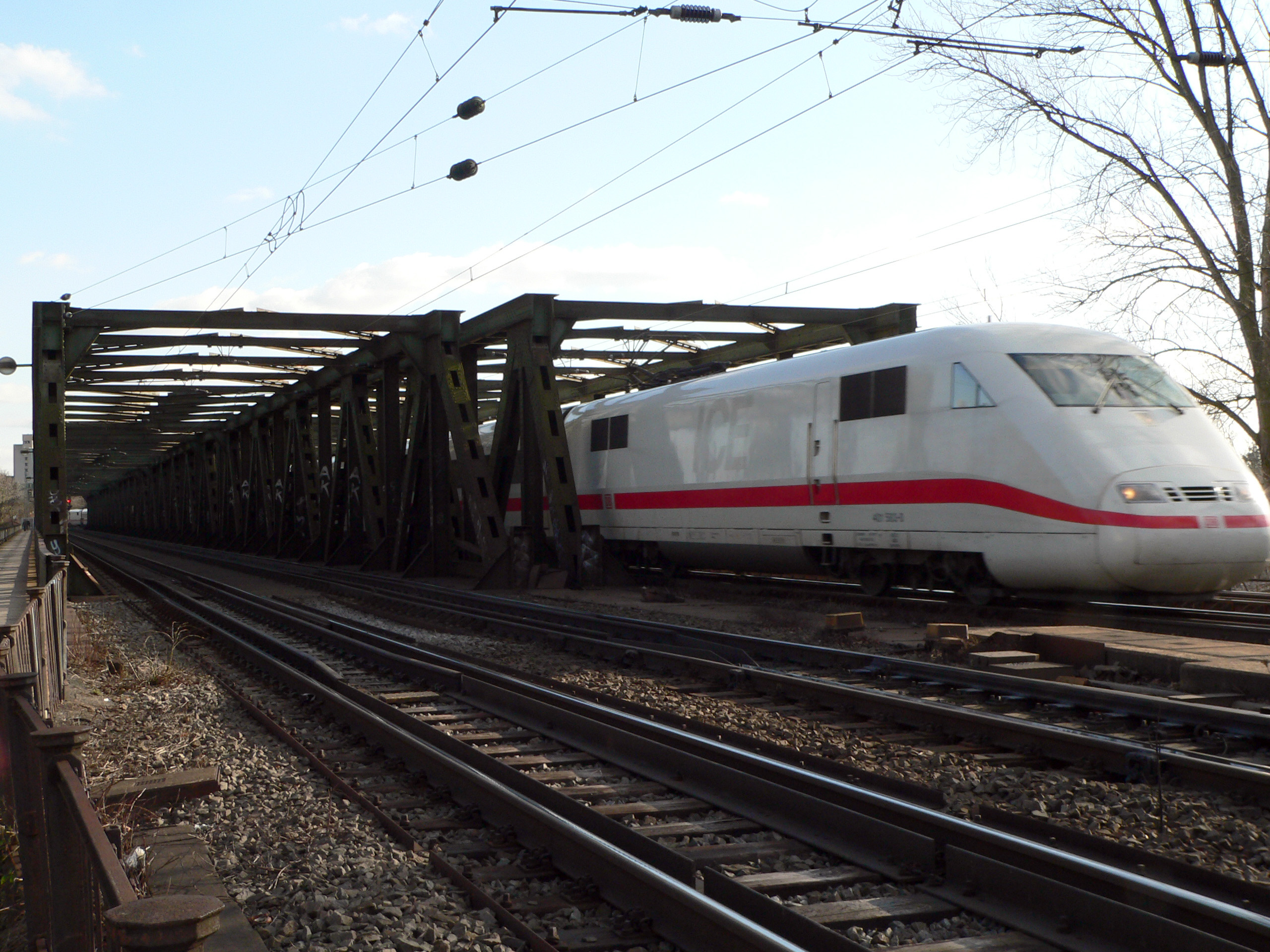 Main-Neckar-Brücke vom Nordufer